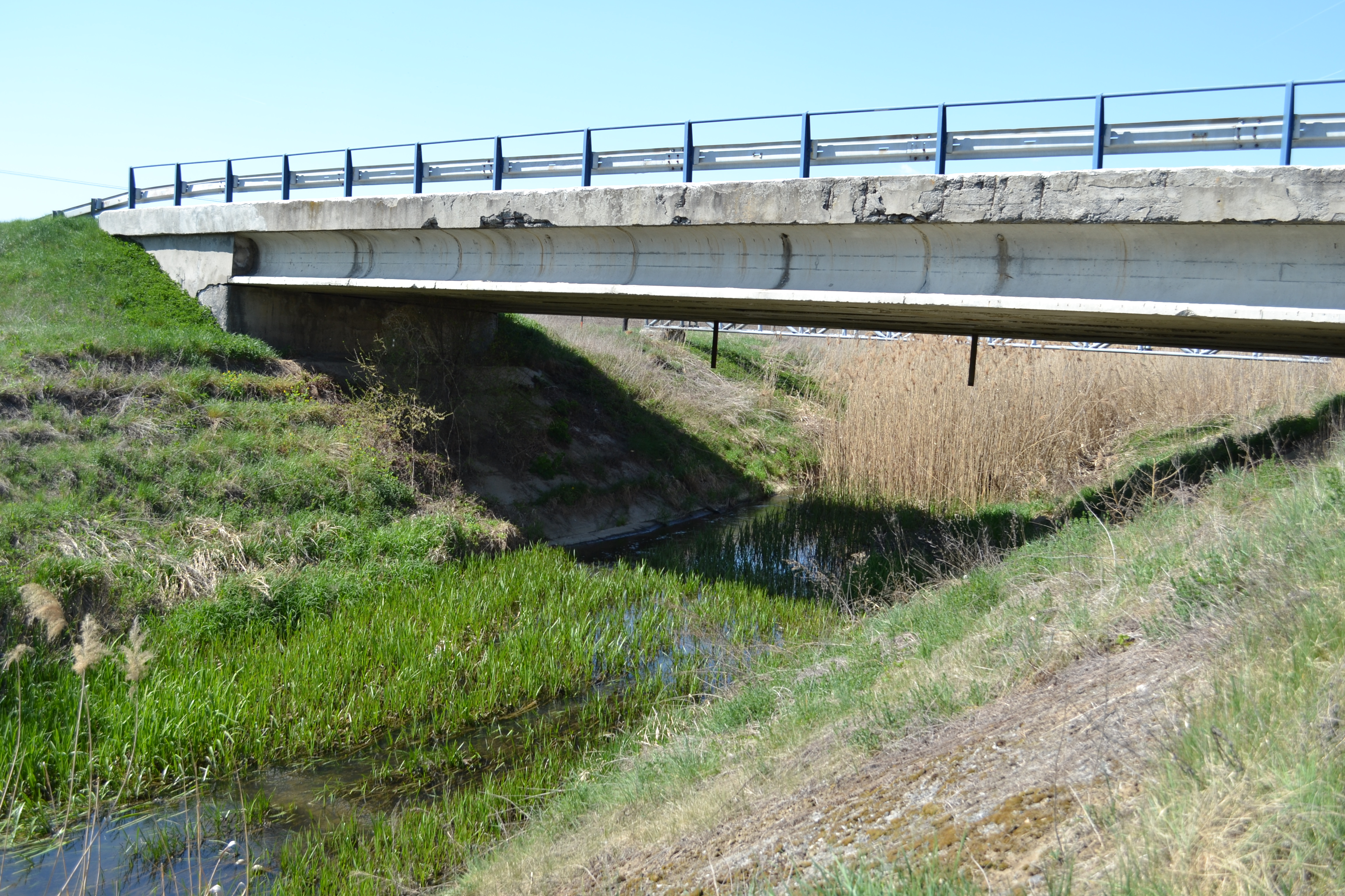 Cestný most nad riečkou Suchá pri obci Šávoľ